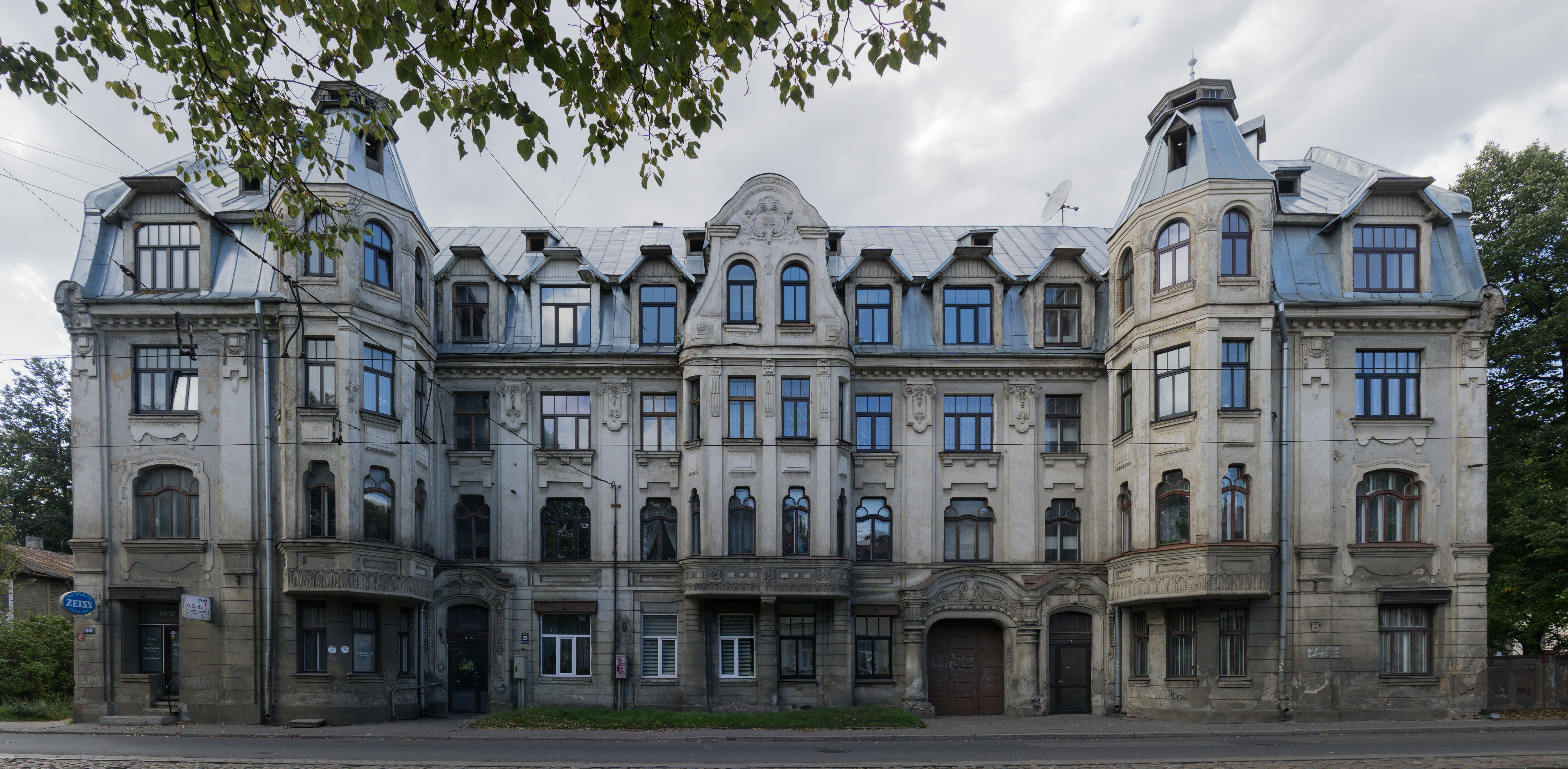 Dzīvojamā ēka, Rīga, Slokas iela 29/1